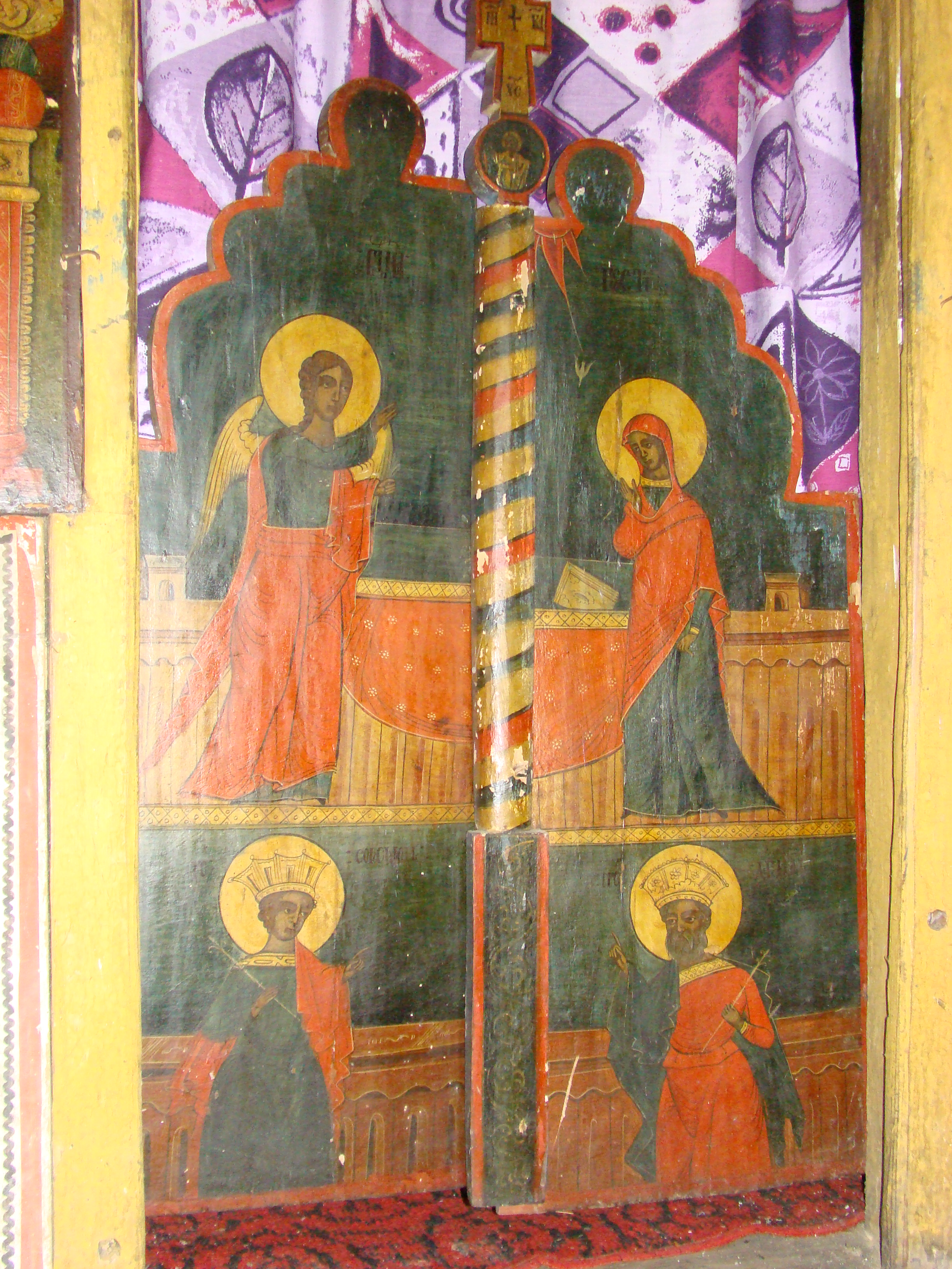 Biserica de lemn „Sf.Voievozi” din Izverna, Mehedinți